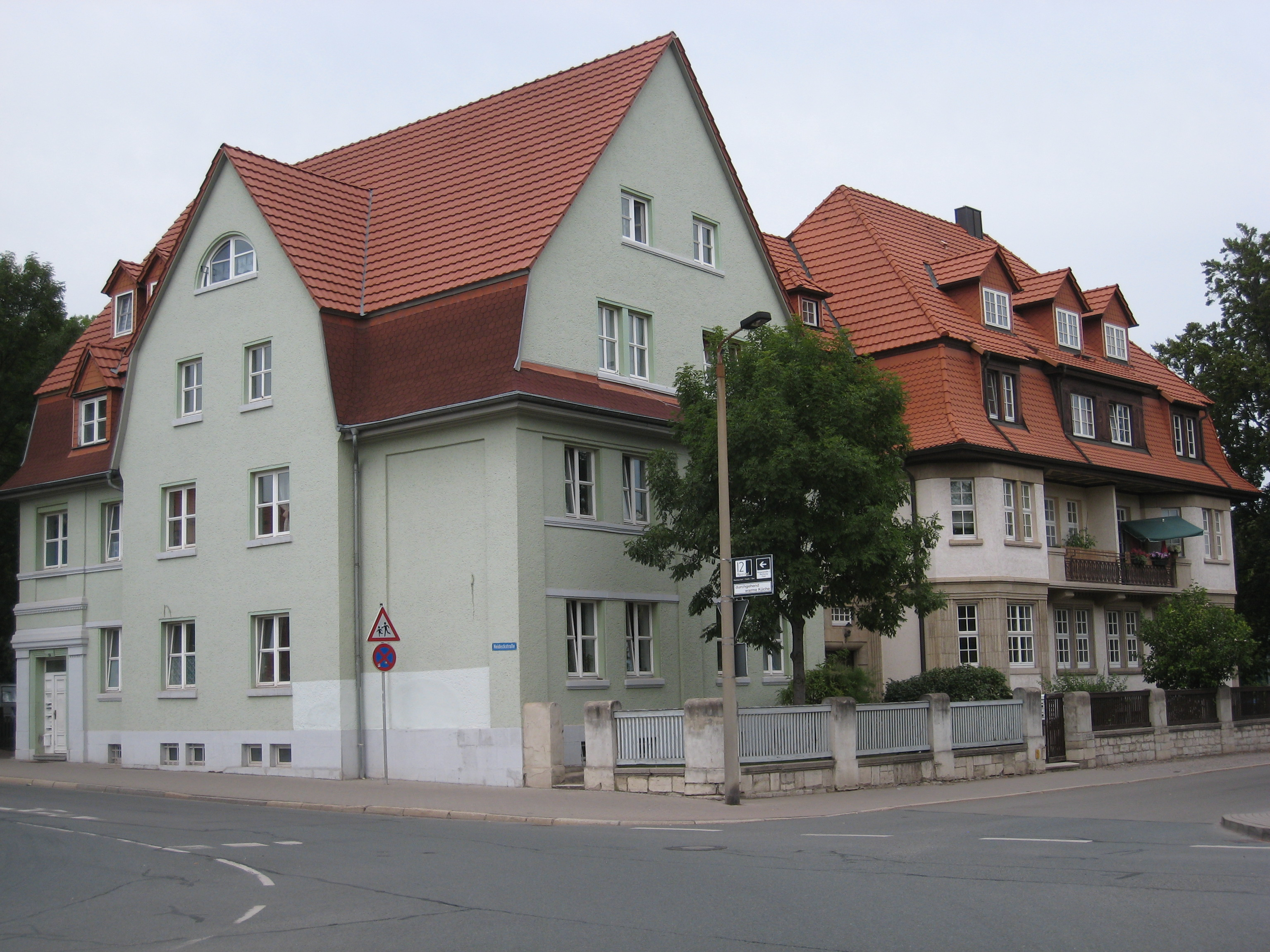 Eckgebäude Neideckstraße - Wollmarkt 8 in Arnstadt